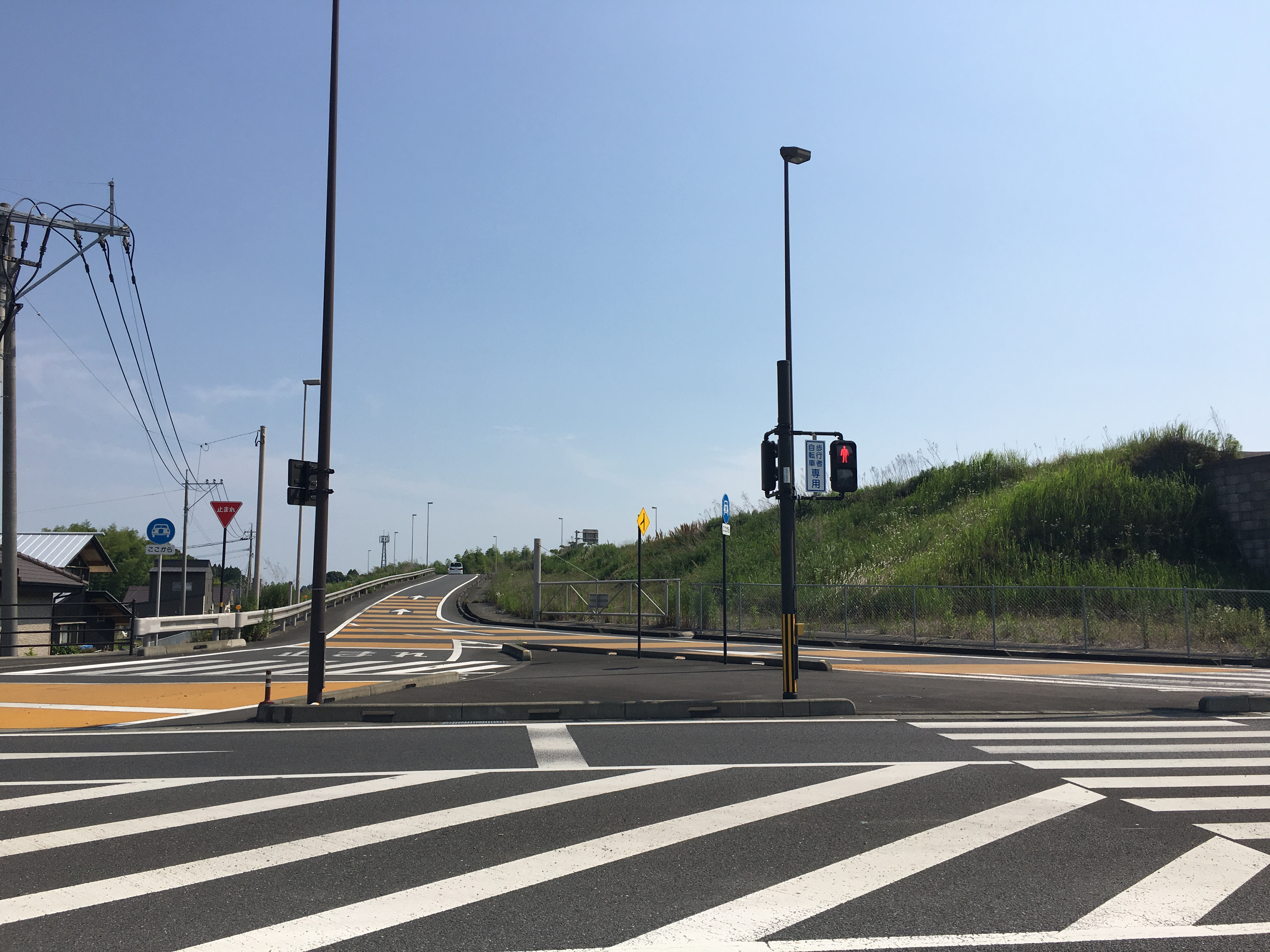 平塚ICの志布志方面インランプ。